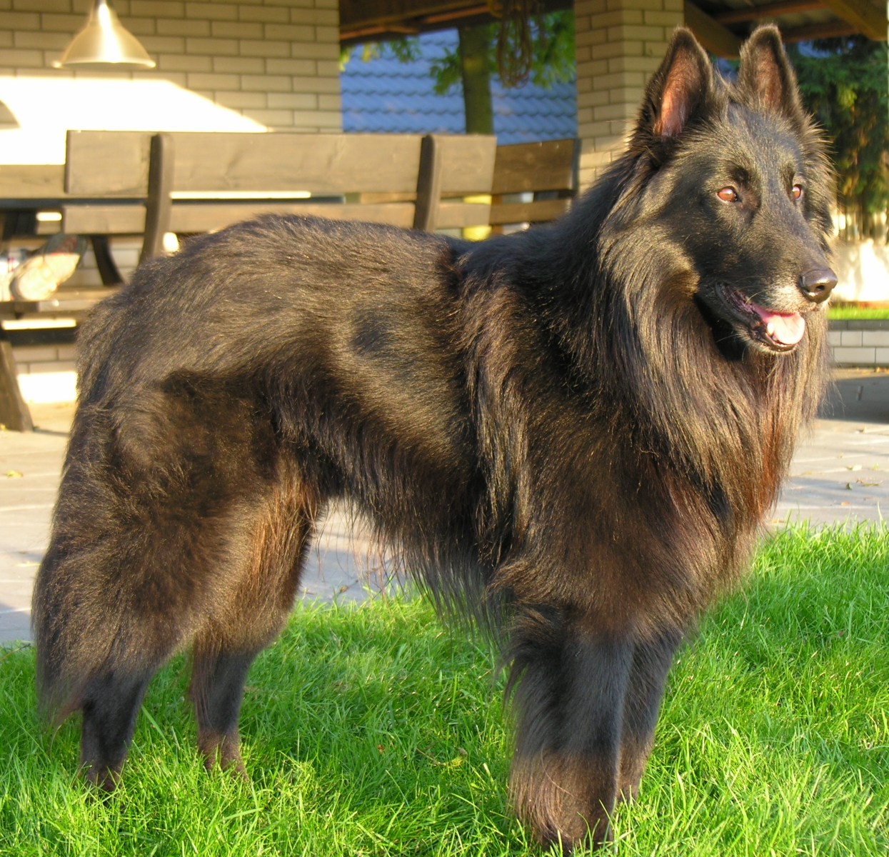 Pies MEN - Belgian Groenendael - DEIMOS Astra Canina, czarny, ur. 30.01.2001, nr rej. 6227/VI/01, PKR. I-38655, o. Ch.Pl. SHEPHERD-OROYA Terwipon, m. Ch.Pl. ANIKA Rema, CHAMPION POLSKI